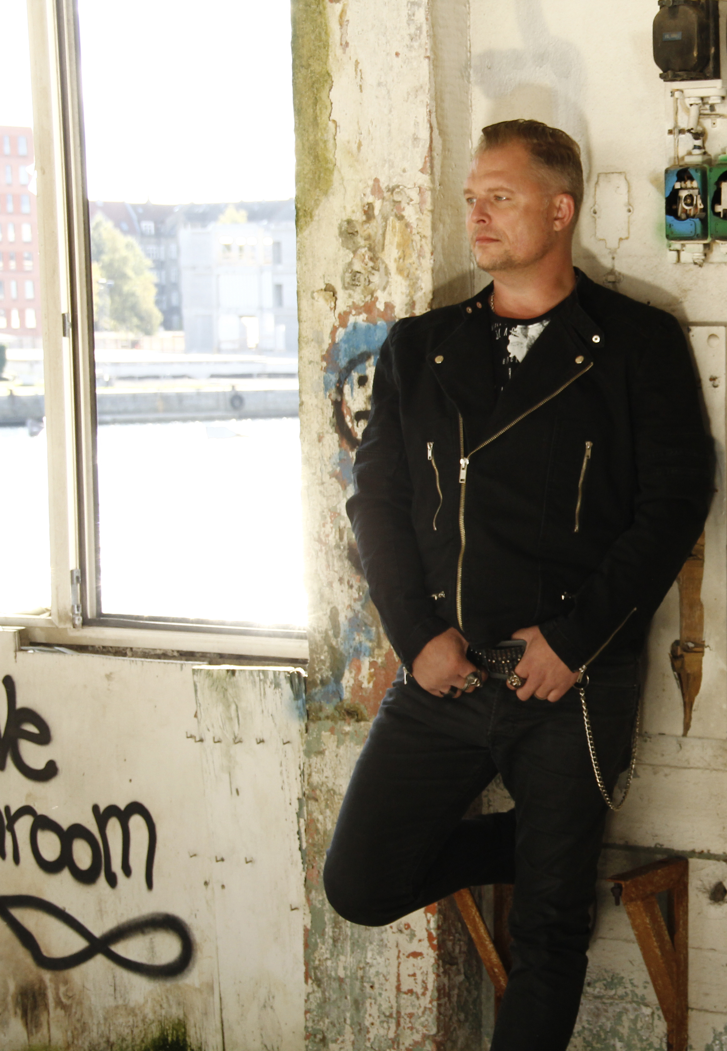 Official Michael Kratz press photo